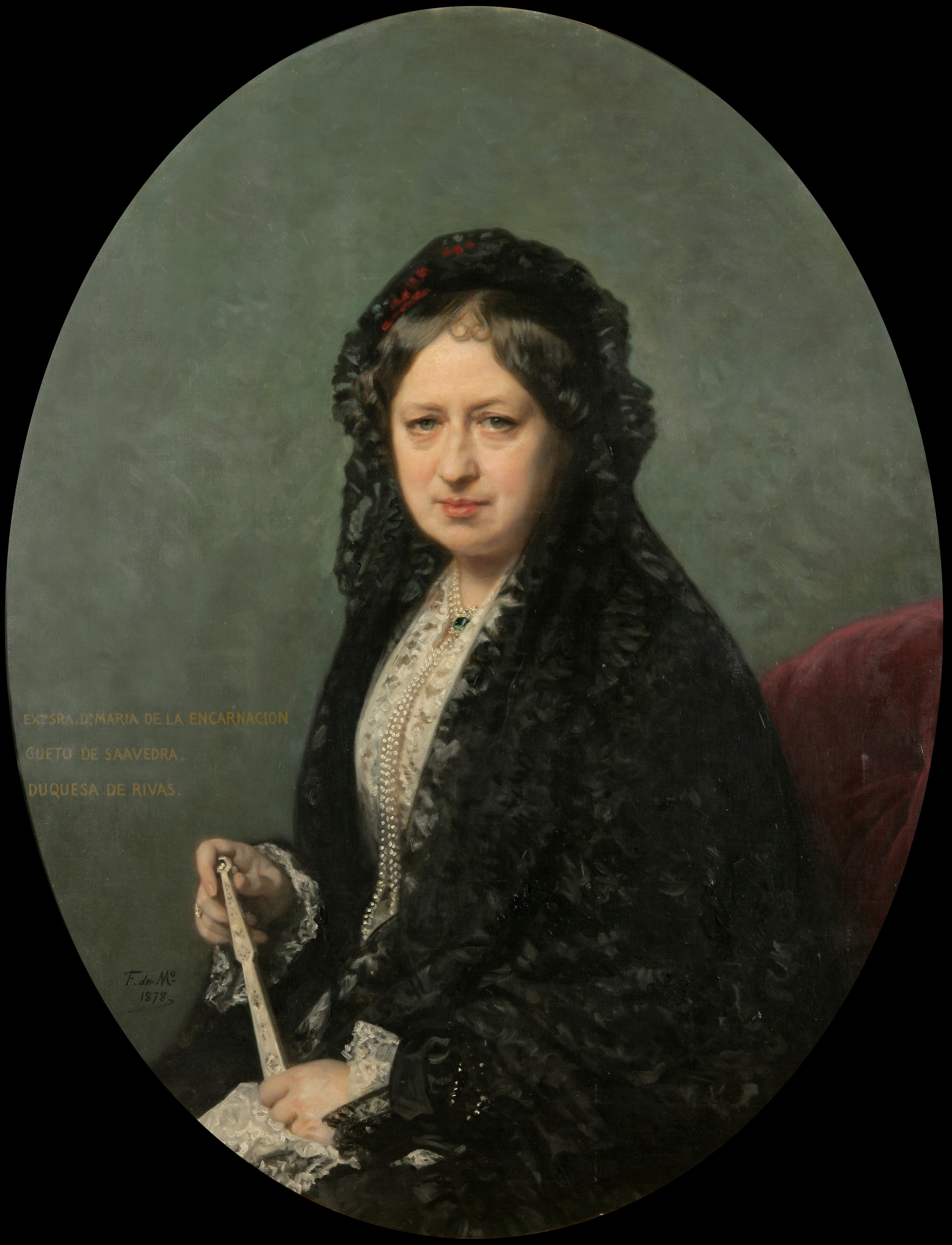 Retrato de María Encarnación Cueto de Saavedra, duquesa consorte de Rivas por su matrimonio con el duque de Rivas, Ángel de Saavedra.